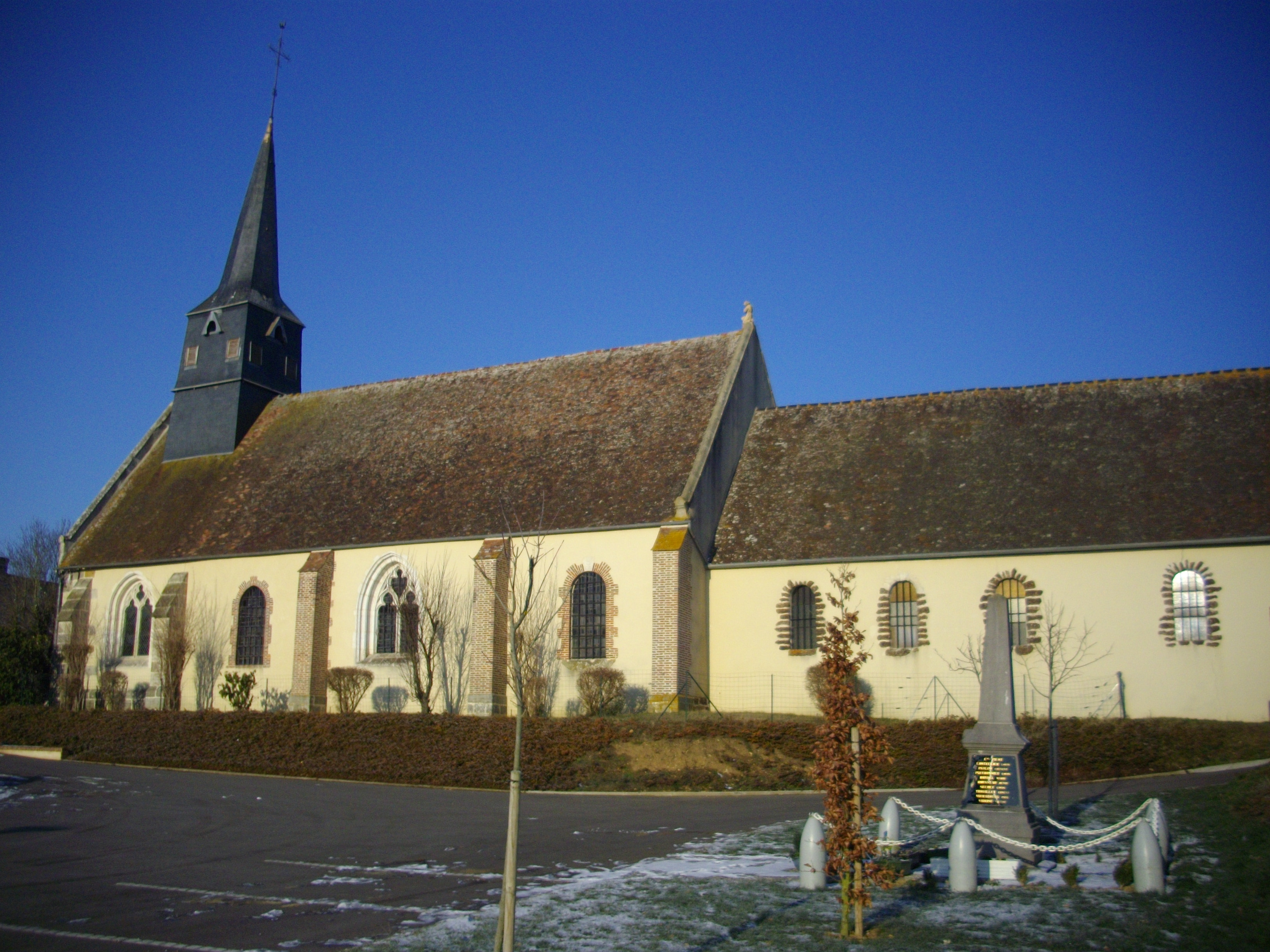 Église paroissiale de Saint-Martin-d'Écublei, dédiée à Saint-Marin